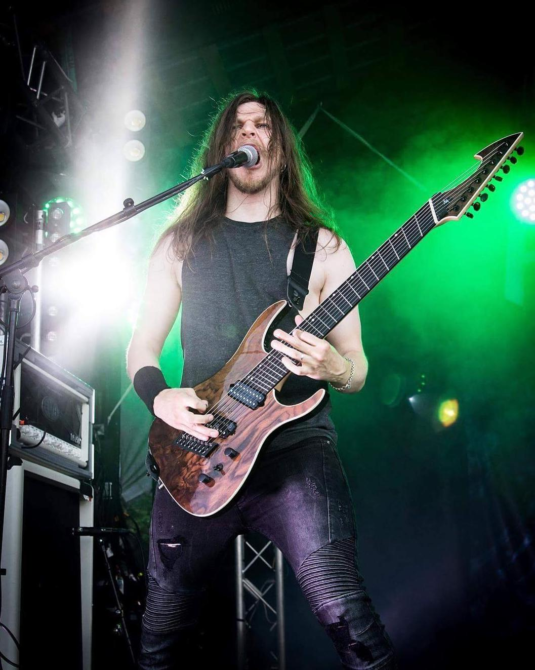 Kalliojärvi esiintymässä Humavoid-yhtyeensä kanssa Dark River -festivaalilla 2017.